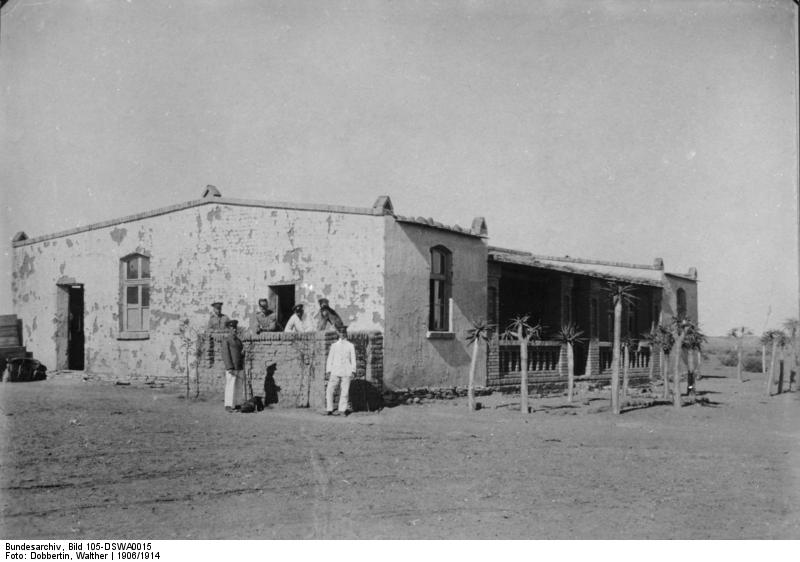 Polizeistation Spitzkoppe (Namaland)